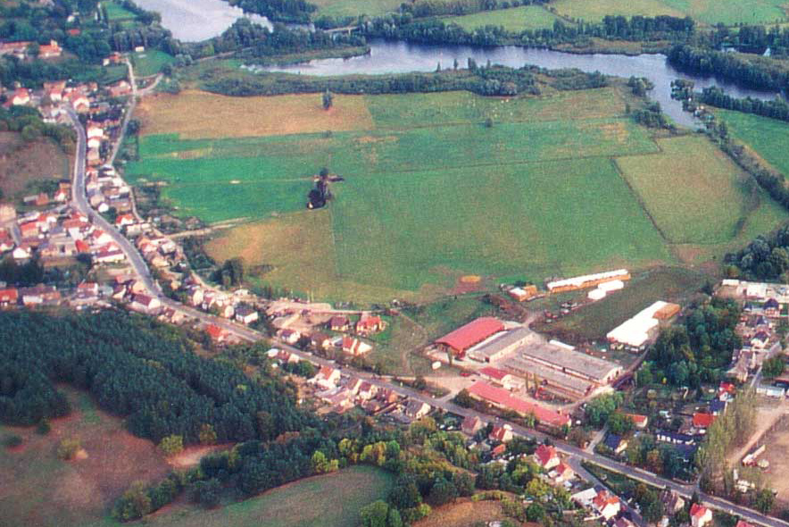 Luftaufnahme von Liepe